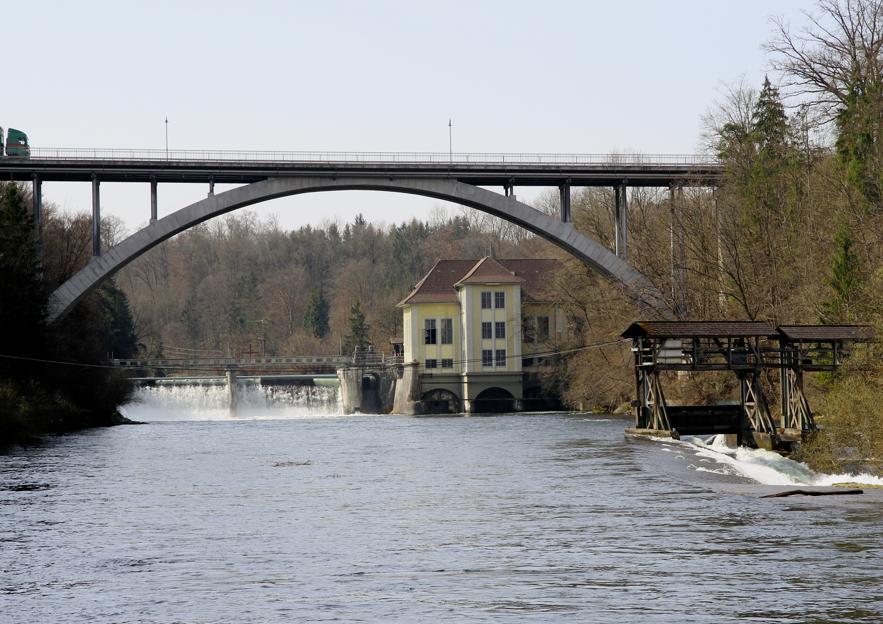 Die Traunfallbrücke. Eine Stahlbeton-Brücke, die 1925 nach einem Entwurf des Architekten Julius Schulte errichtet, im 2. Weltkrieg zerstört und 1948 in gleicher Form wieder aufgebaut wurde. Im Vordergrund rechts eine Wehranlage, die zum Kraftwerk Traunfall gehört und im Hintergrund das Kraftwerk Siebenbrunn.